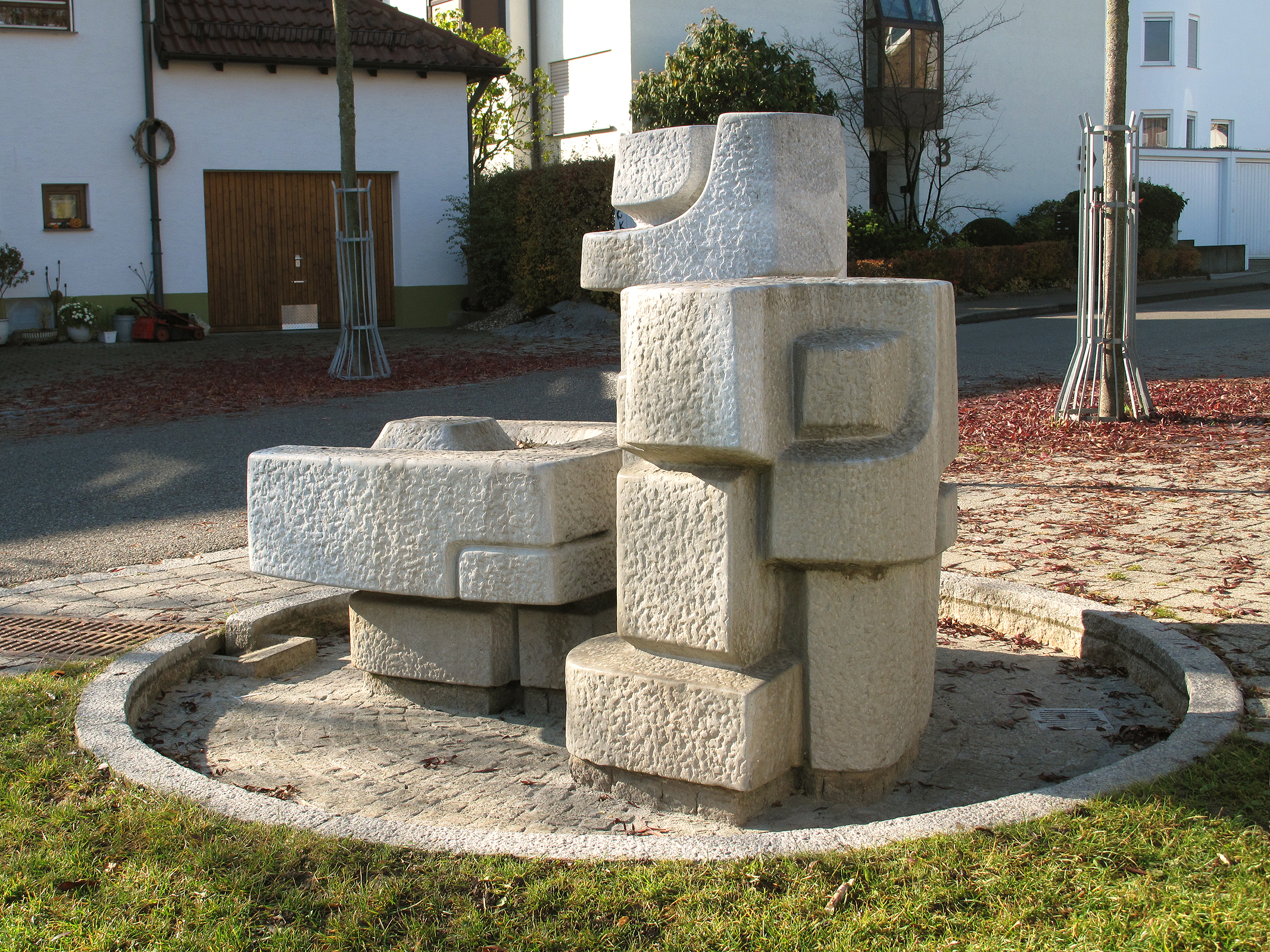 Gerhard Tagwerker, Konstruktive Brunnenskulptur, 1970, - Deutschland, Baden-Württemberg, Leinfelden-Echterdingen, Oberaichen, Häuserwiesenstraße